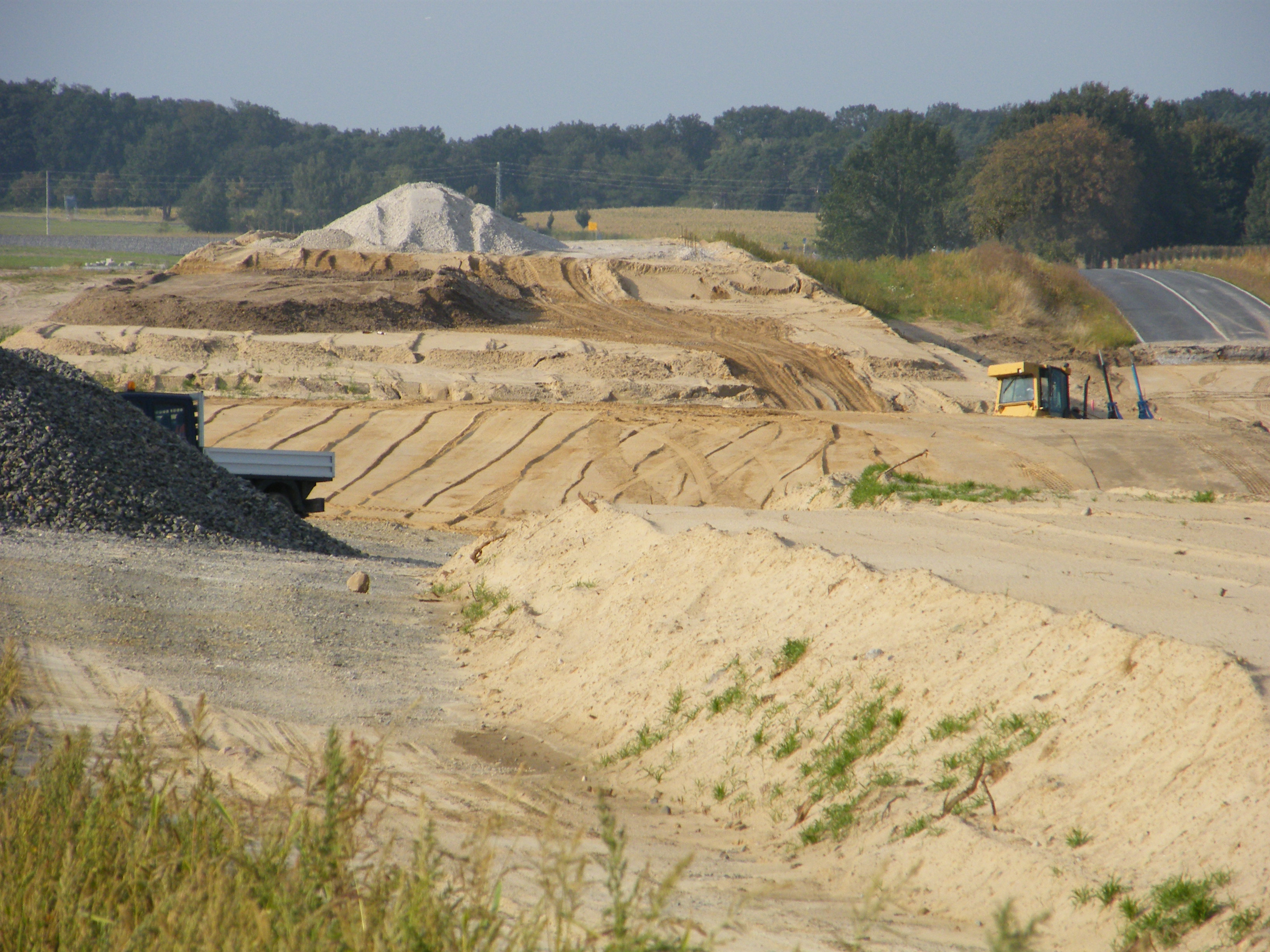 Bauzustand 09.09